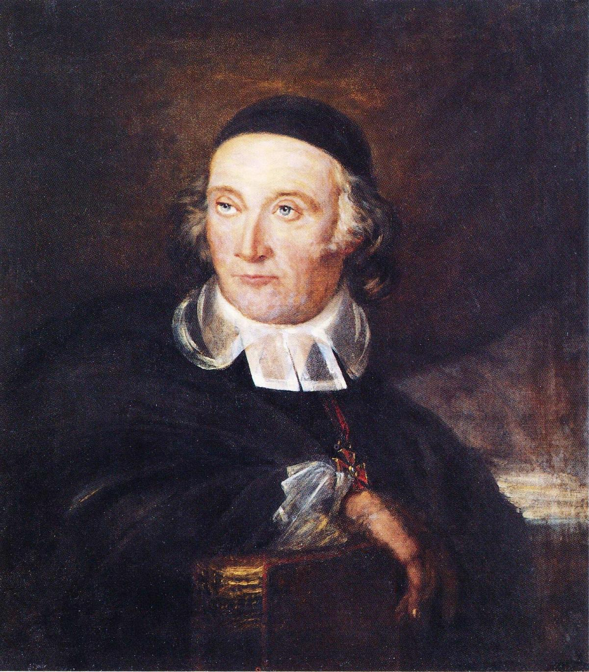 Turun Akatemian teologian professori Jacob Bonsdorff. Gustaf Wilhelm Finnbergin maalaama muotokuva vaurioitui vuoden 1827 Turun palossa, joten Fredrik Ahlstedt korjaili sitä 1880-luvulla ja maalasi muut osat paitsi kasvot uudelleen alkuperäisestä versiosta poikkeaviksi. Muotokuva kuuluu Helsingin yliopiston kokoelmiin.